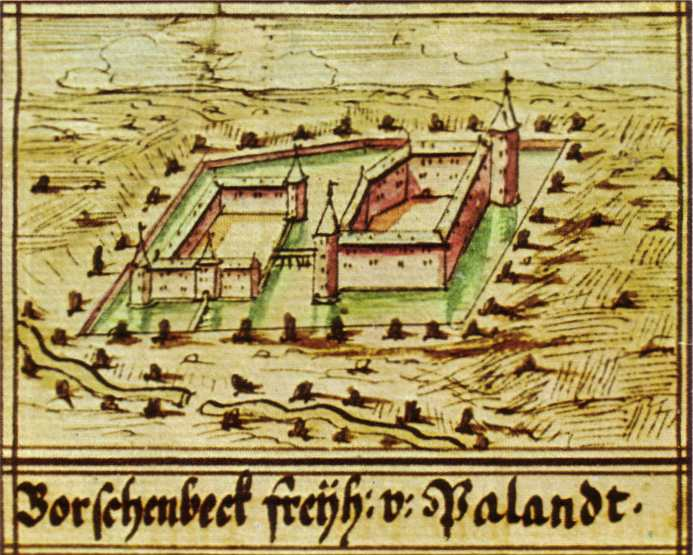 Haus Palandt, Erkelenz-Borschemich Codex Welser